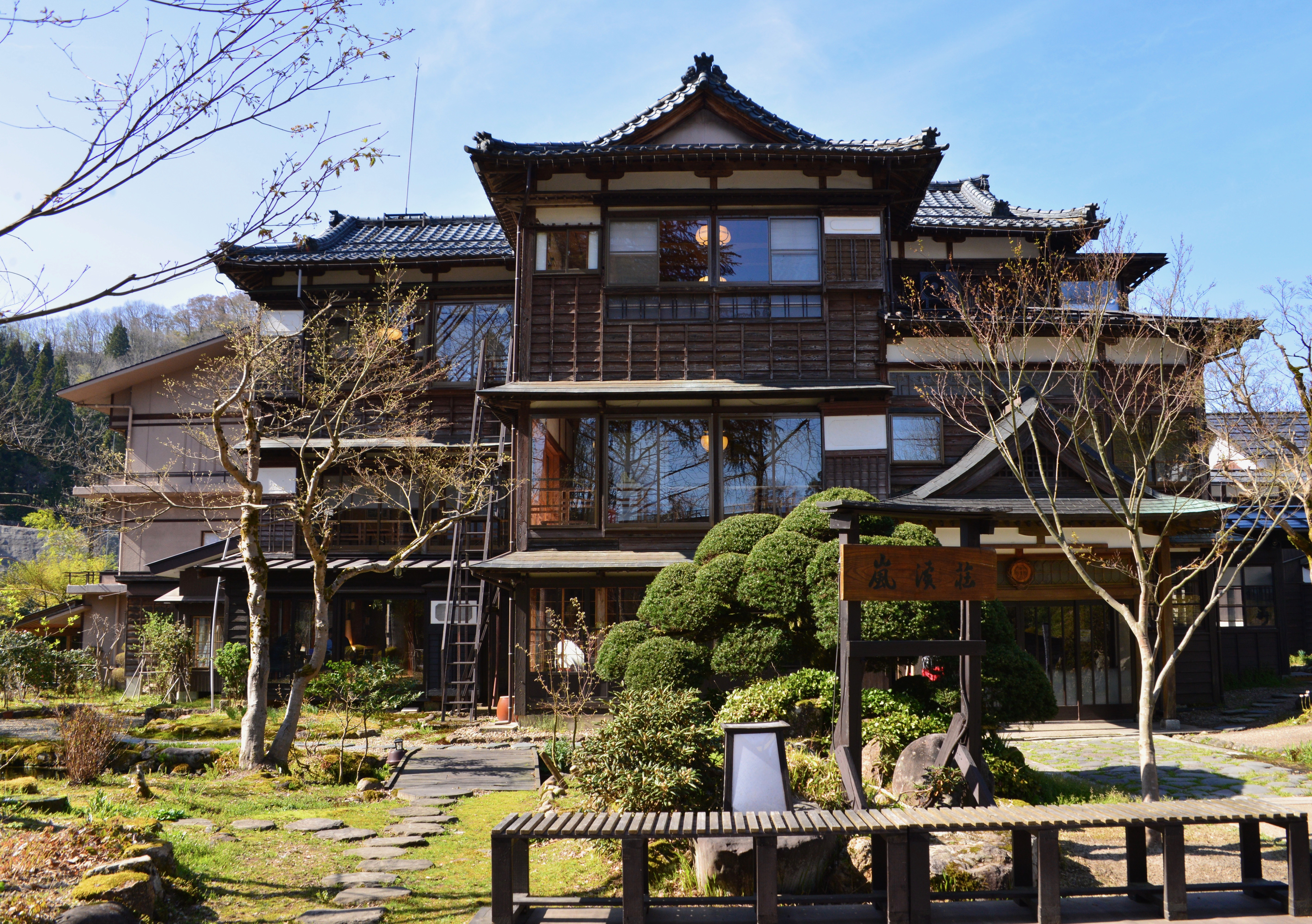 越後長野温泉 嵐渓荘